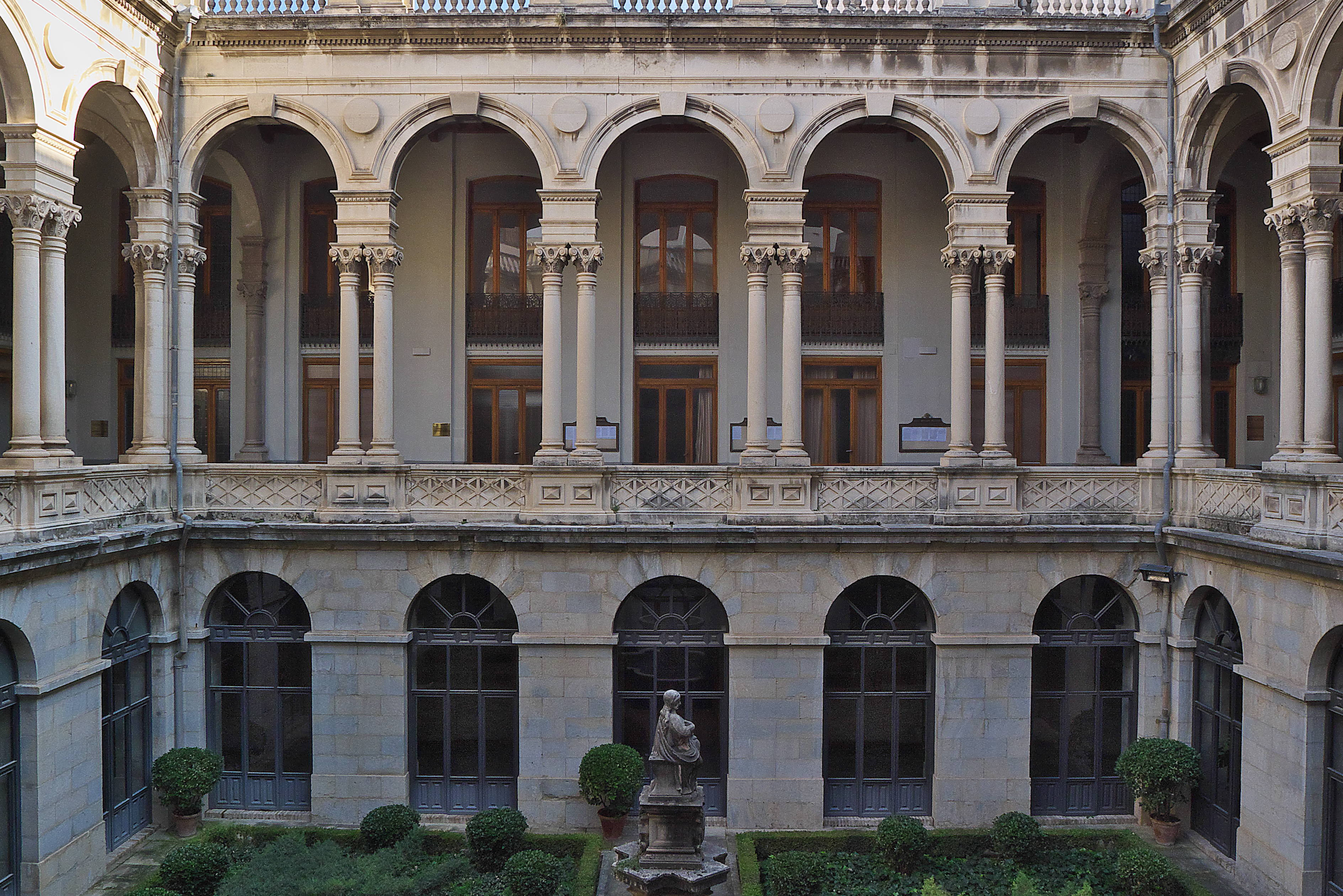 Patio de la Diputación Provincial de Jaén proyectado por Jorge Porrúa Moreno (1875). Ricardo Marcos Bausá (1880) continuará la dirección.